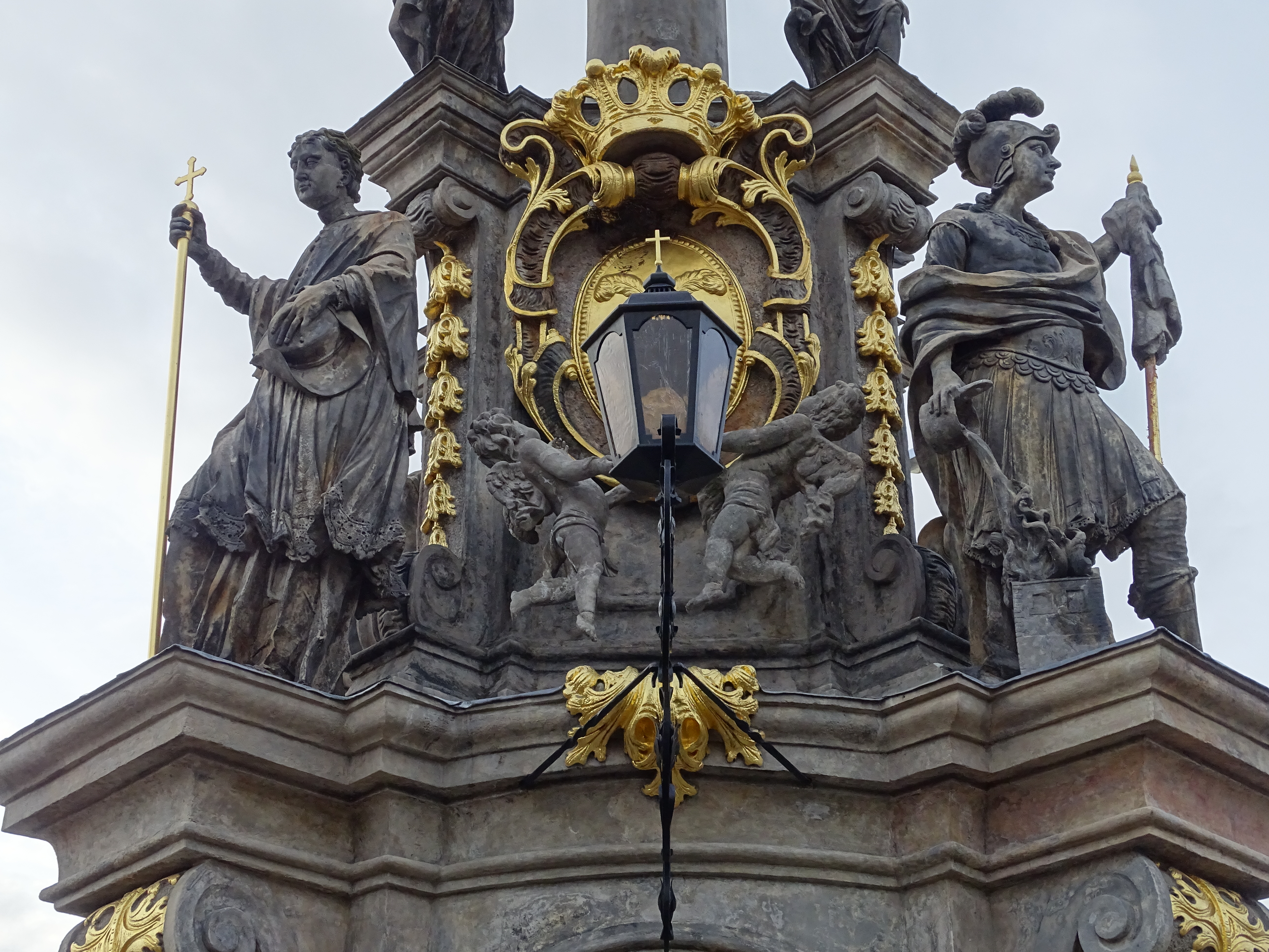 detail sloupu